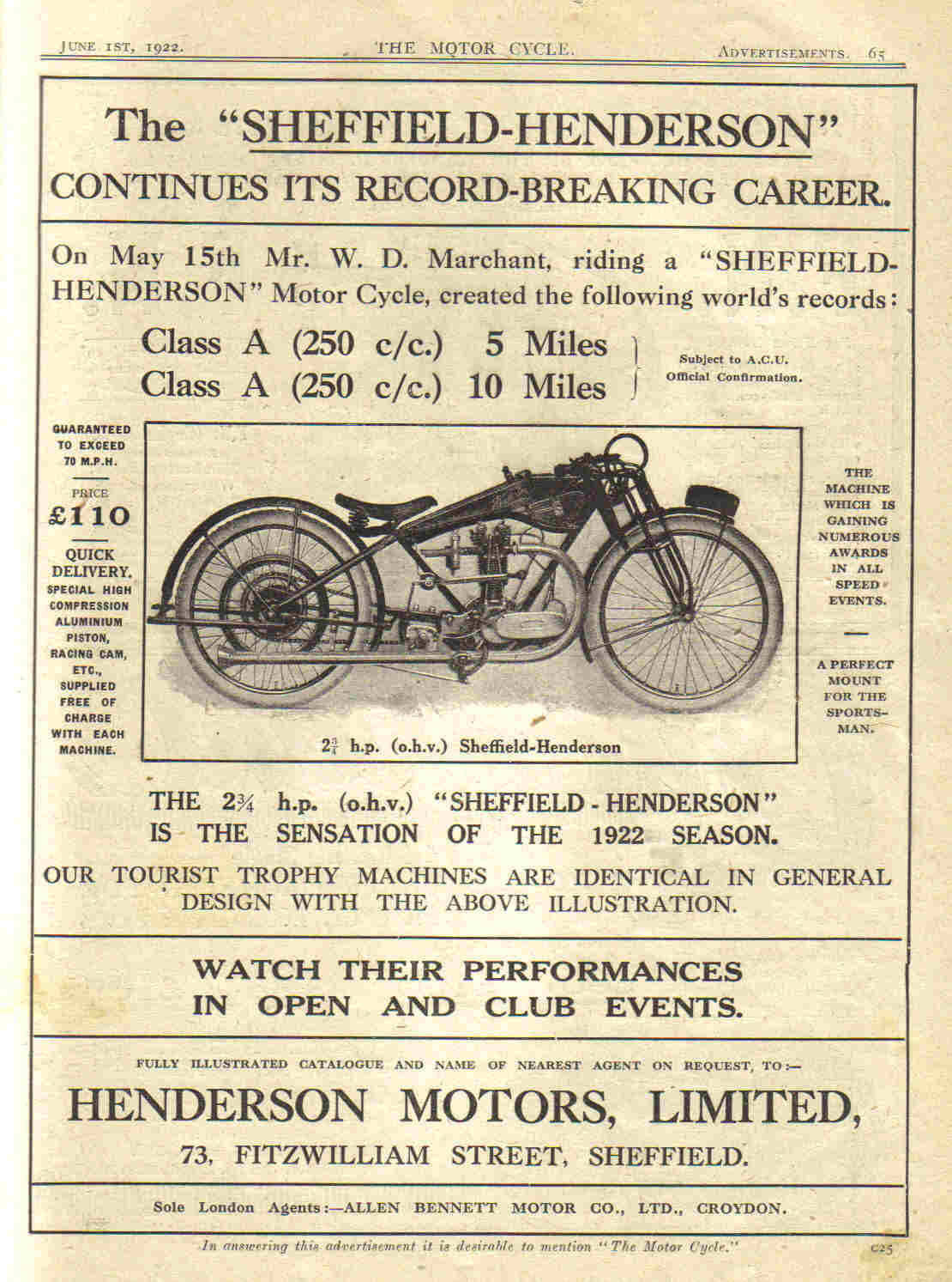 Advertisement Sheffield-Henderson motocycles 1922